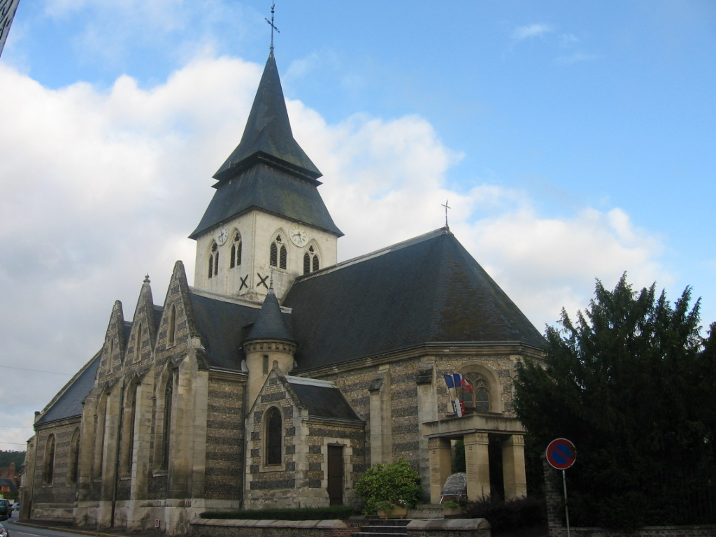 Eglise de Serquigny